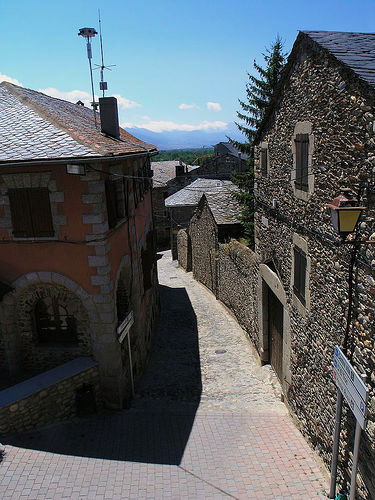 Carrer de Llívia, Girona (Espanya)